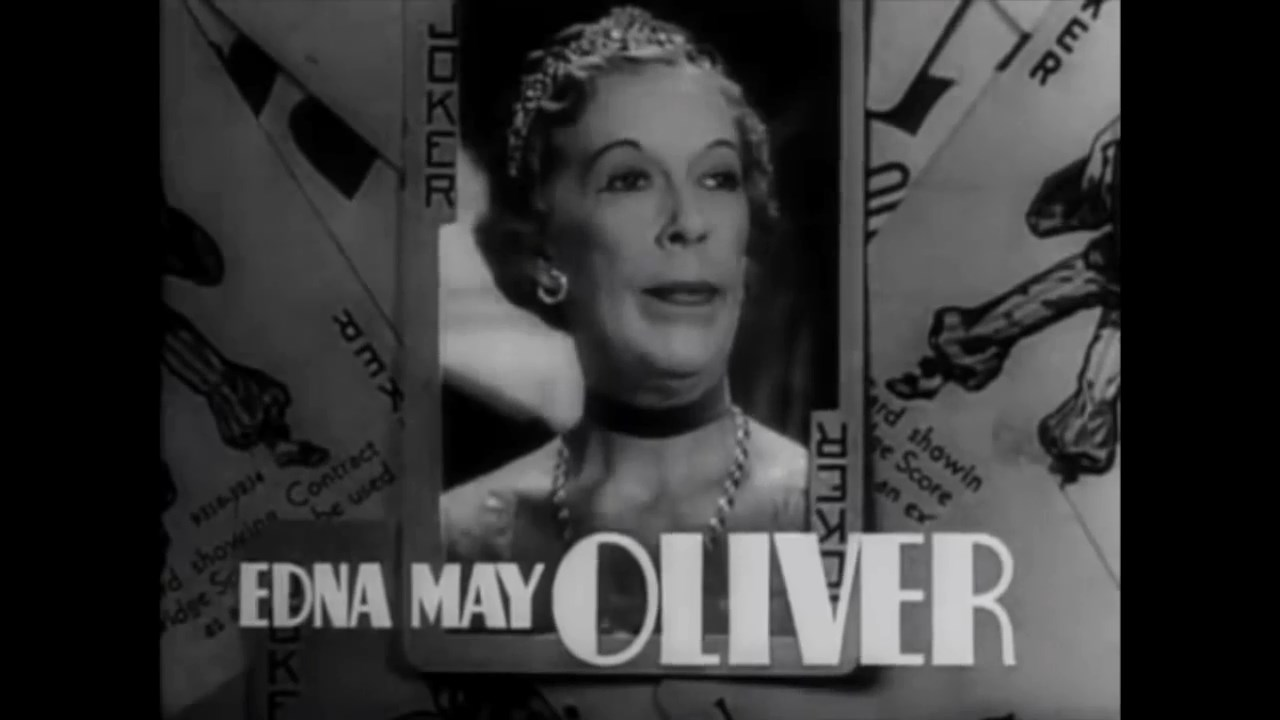 Edna May Oliver - Trailer du film Rosalie (1937)